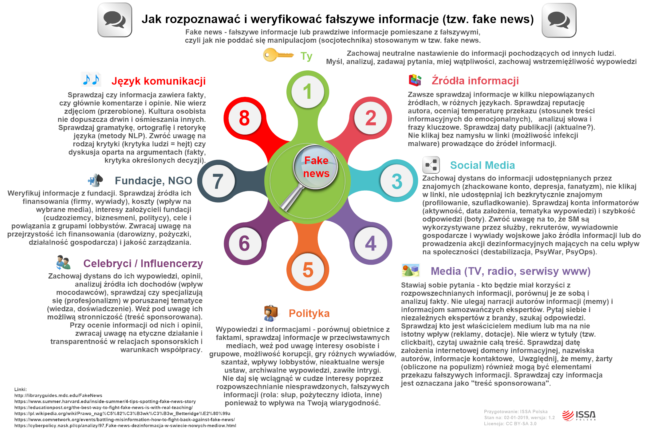 Jak rozpoznawać fałszywe informacje i weryfikować je bazując na wielu źródłach.